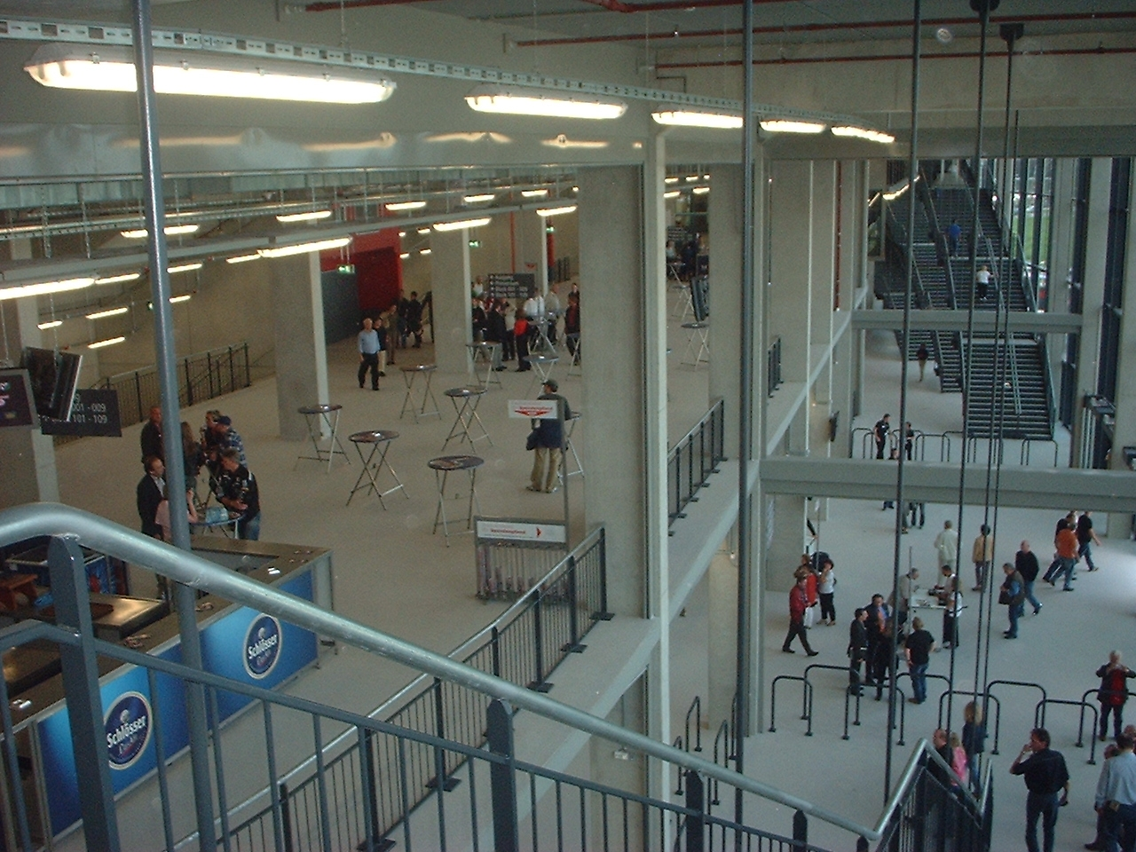 ISS-Dome in Düsseldorf-Rath